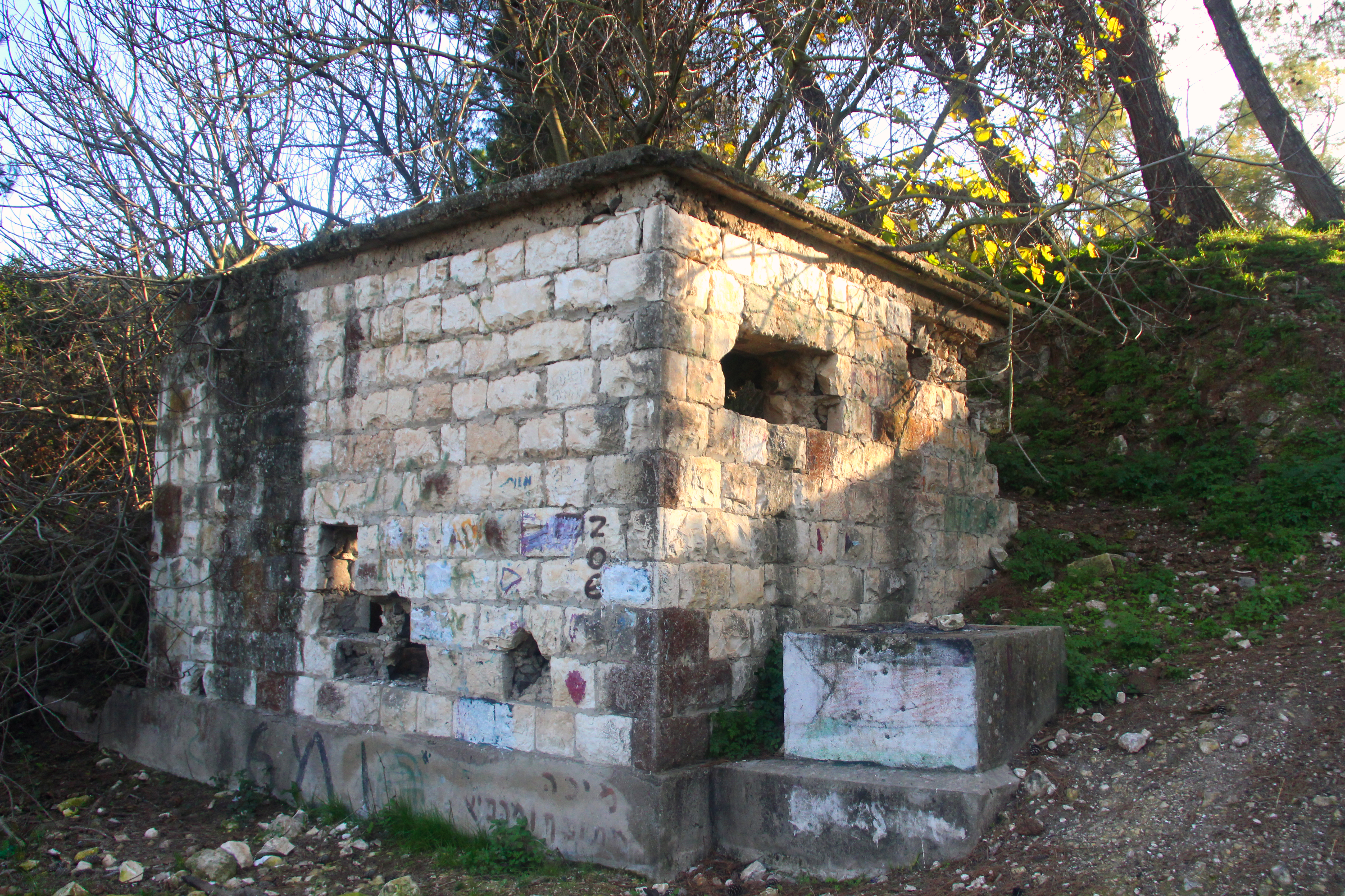 آثار مبنى قديم في قرية اللجون المهجرة